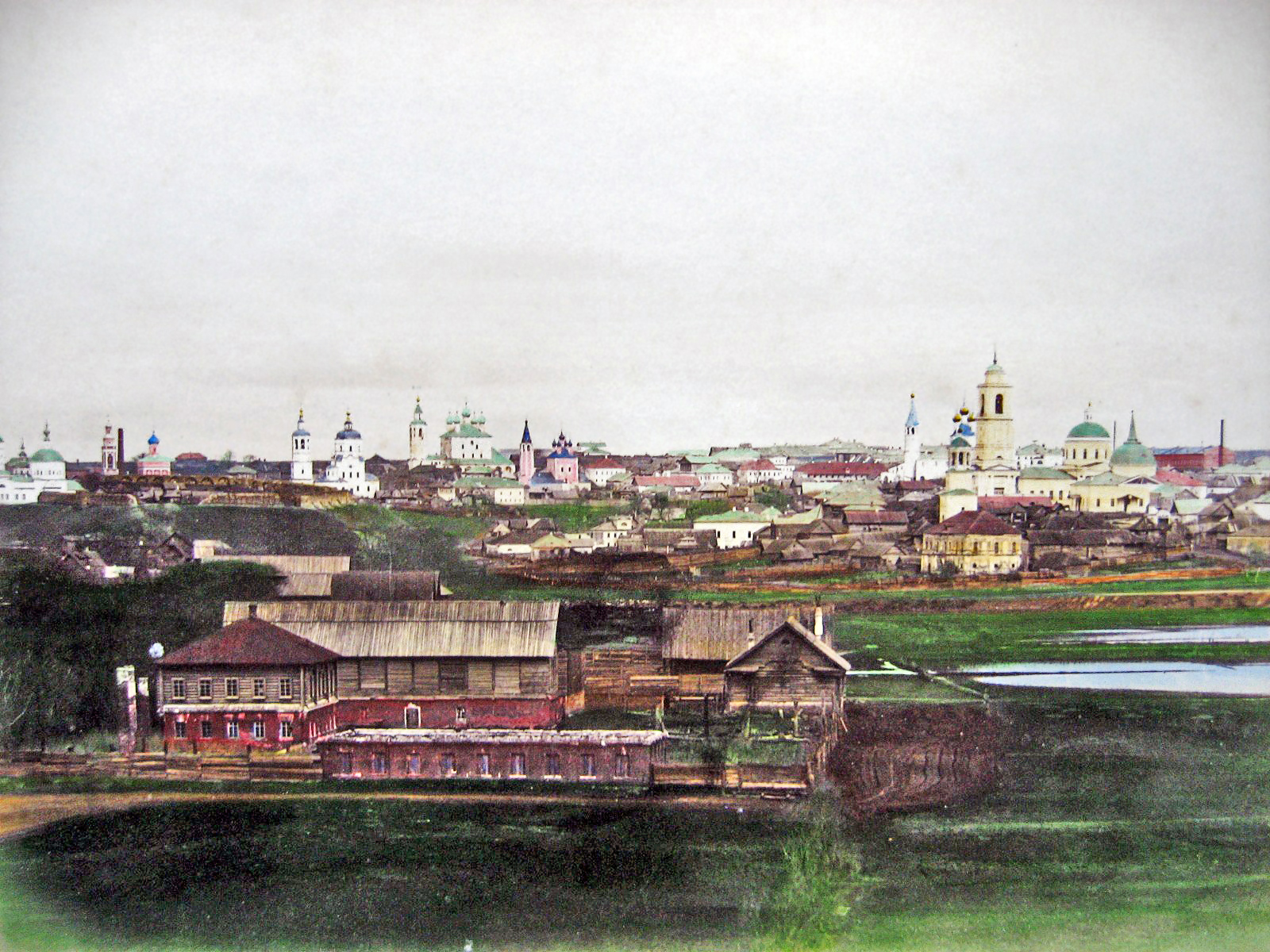 Город Серпухов. Вид с железной дороги.